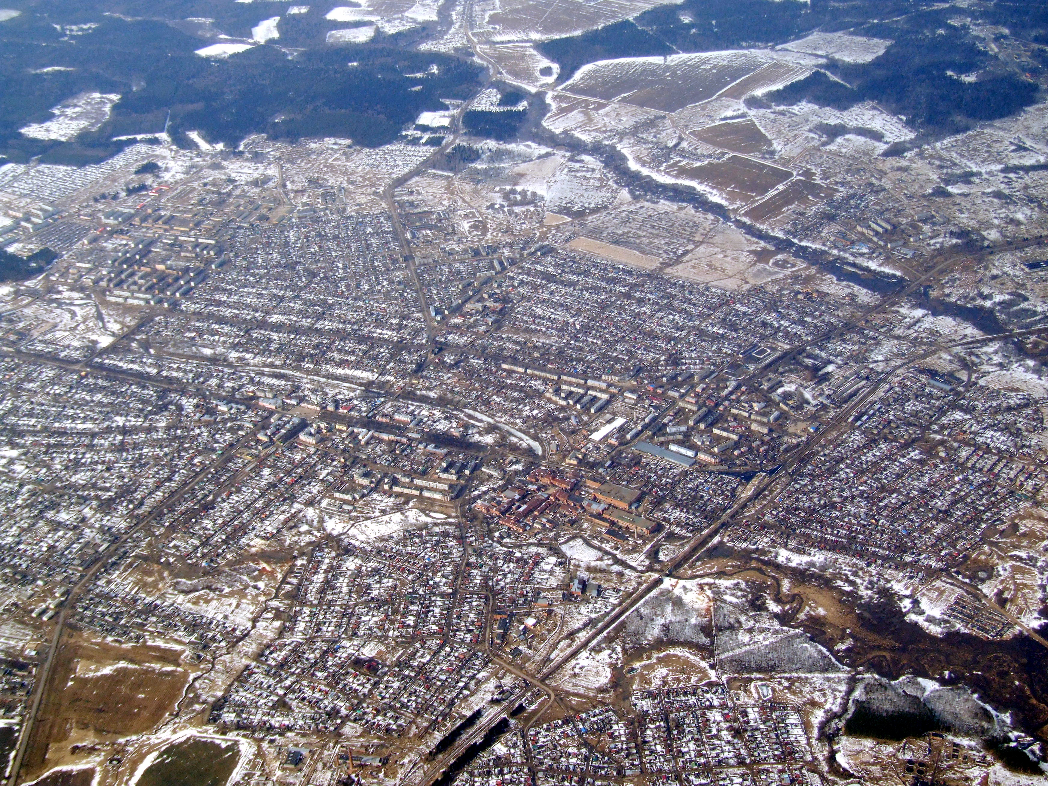 Тейково с высоты 3км.